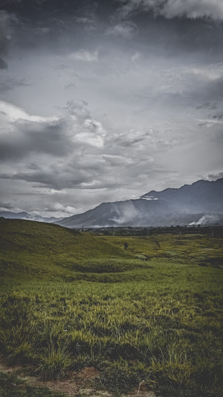 pemandangan bukit, kampung habusa kab. Jayawijaya.